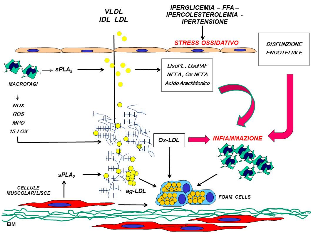 Aterogenesi: ruolo della disfunzione endoteliale e della modificazione intimale delle LDL ad opera delle fosfolipasi secretorie (sPLA2) e degli enzimi ossidativi.